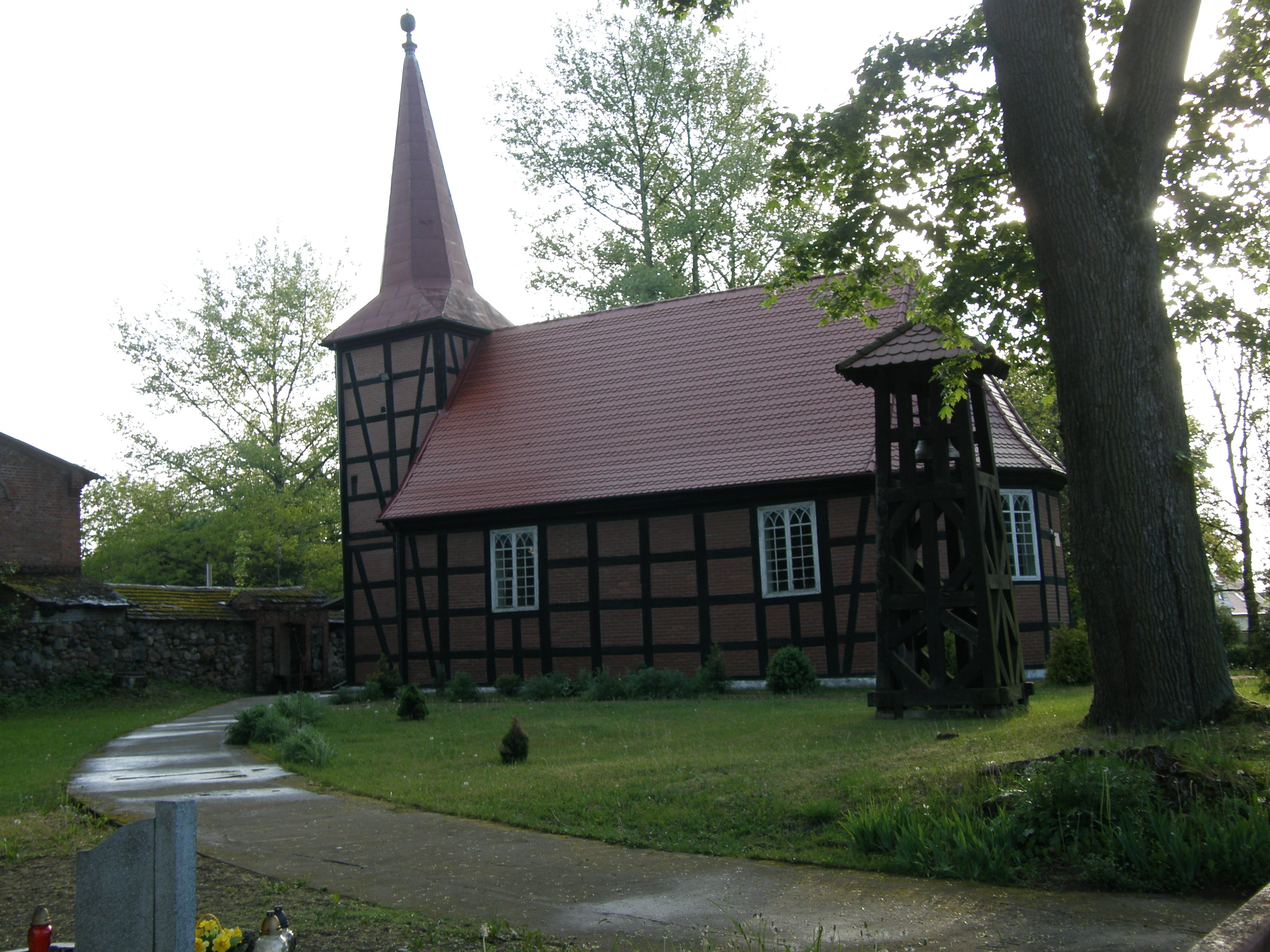 Cieszyno - dawny kościół ewangelicki, obecnie rzymskokatolicki filialny p.w. Św. Krzyża, XVII/XVIII